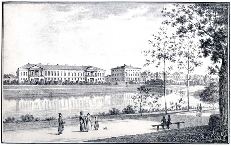 Вид городской больницы с Чёрного озера. Из альбома: Перспективные виды губернского города Казани, рисованы с натуры, литографированы и изданы Василием Туриным. — Москва, 1834.